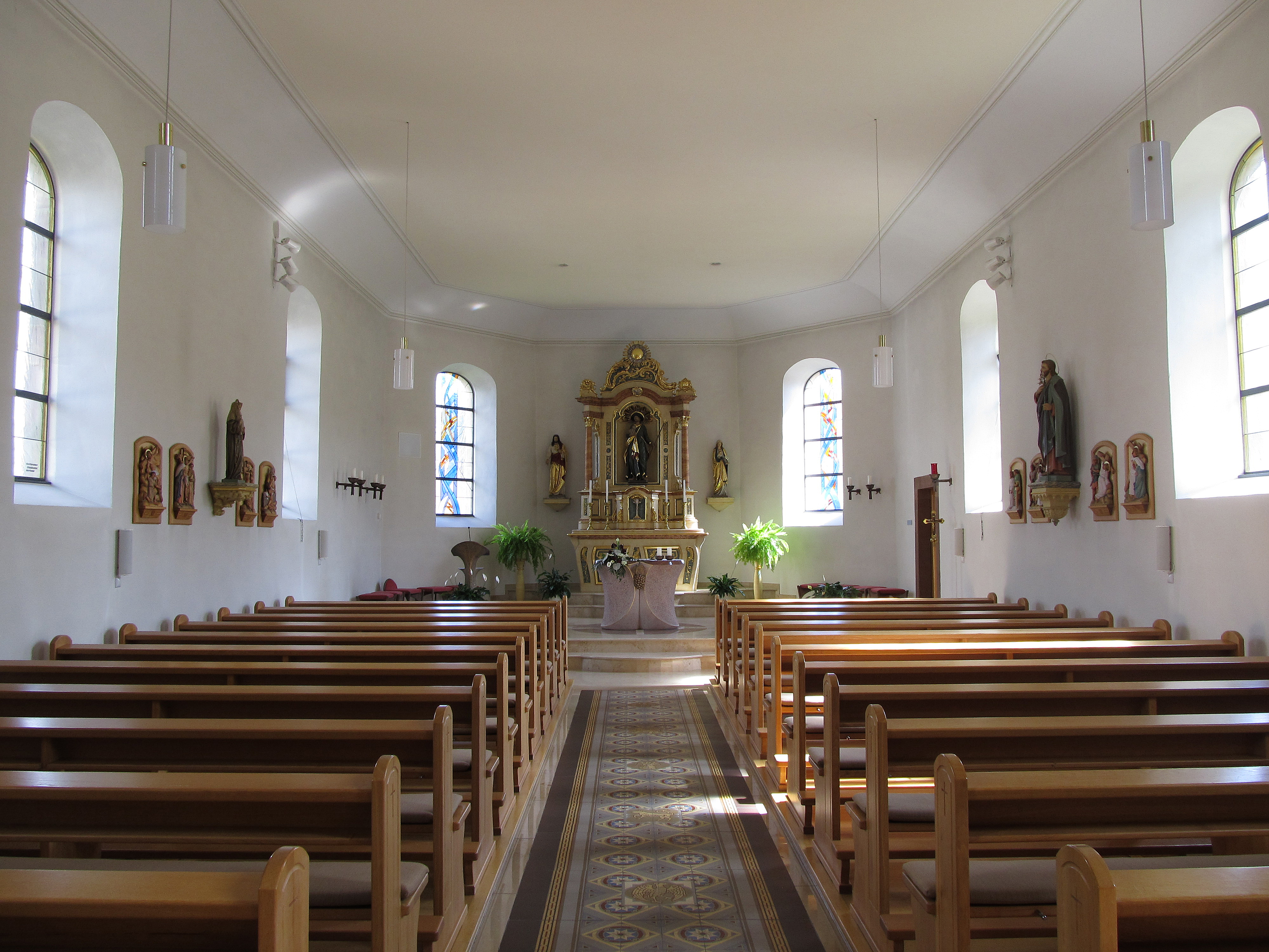 Blick ins Innere der katholischen Pfarrkirche St. Wendelinus in Bliesdalheim, Gemeinde Gersheim, Saarland